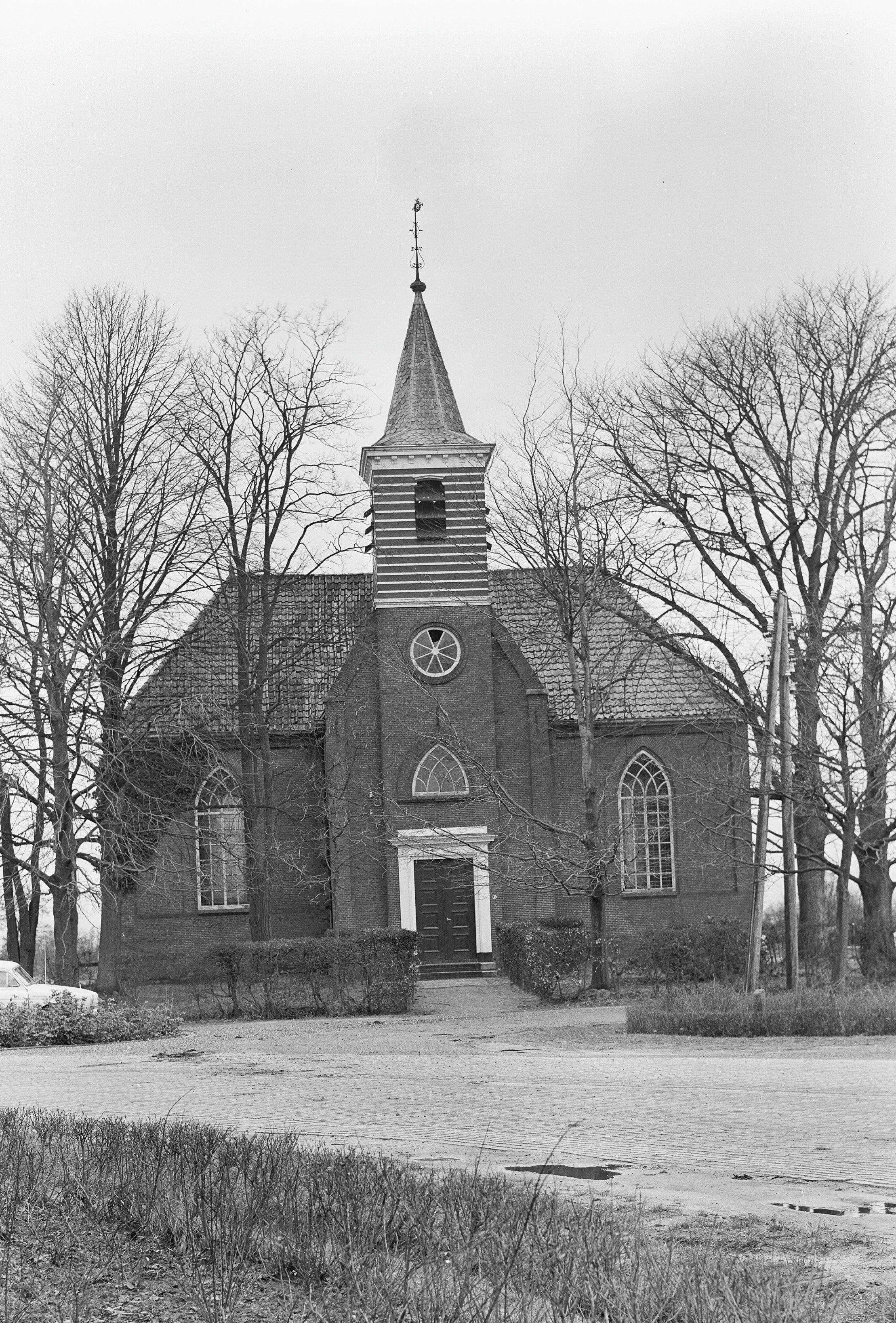 N.H.Kerk: front - Door brand verwoest - Drachtstercompagnie, Ruine - Ned. Hervormde kerk